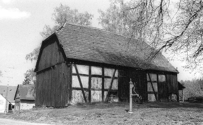 Original image description from the Deutsche Fotothek Spreetal-Neustadt (Spree). Rollmühle, alte Scheune